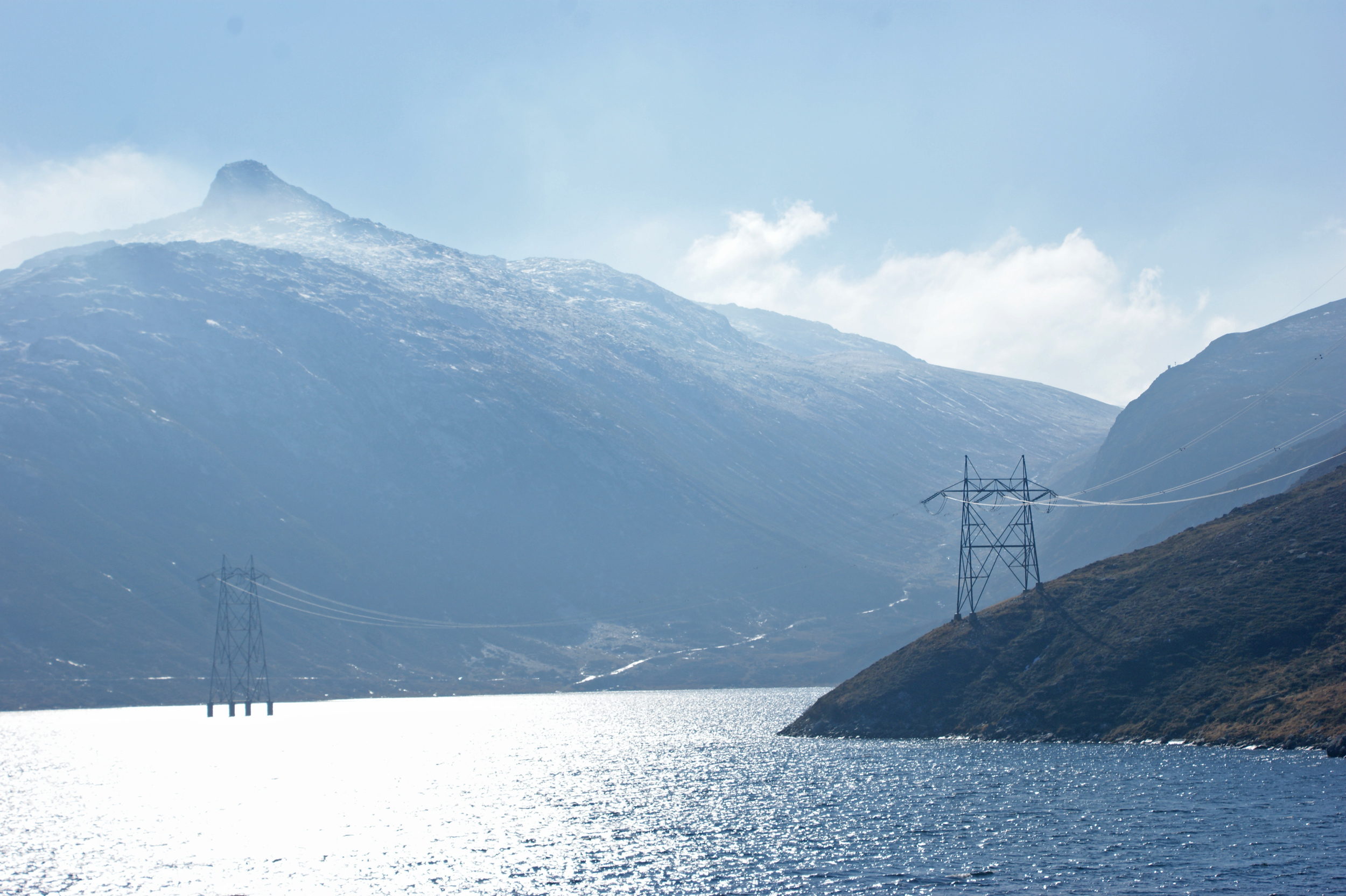 Lai da Sontga Maria, Lukmanier, mit Pizzo dell'Uomo